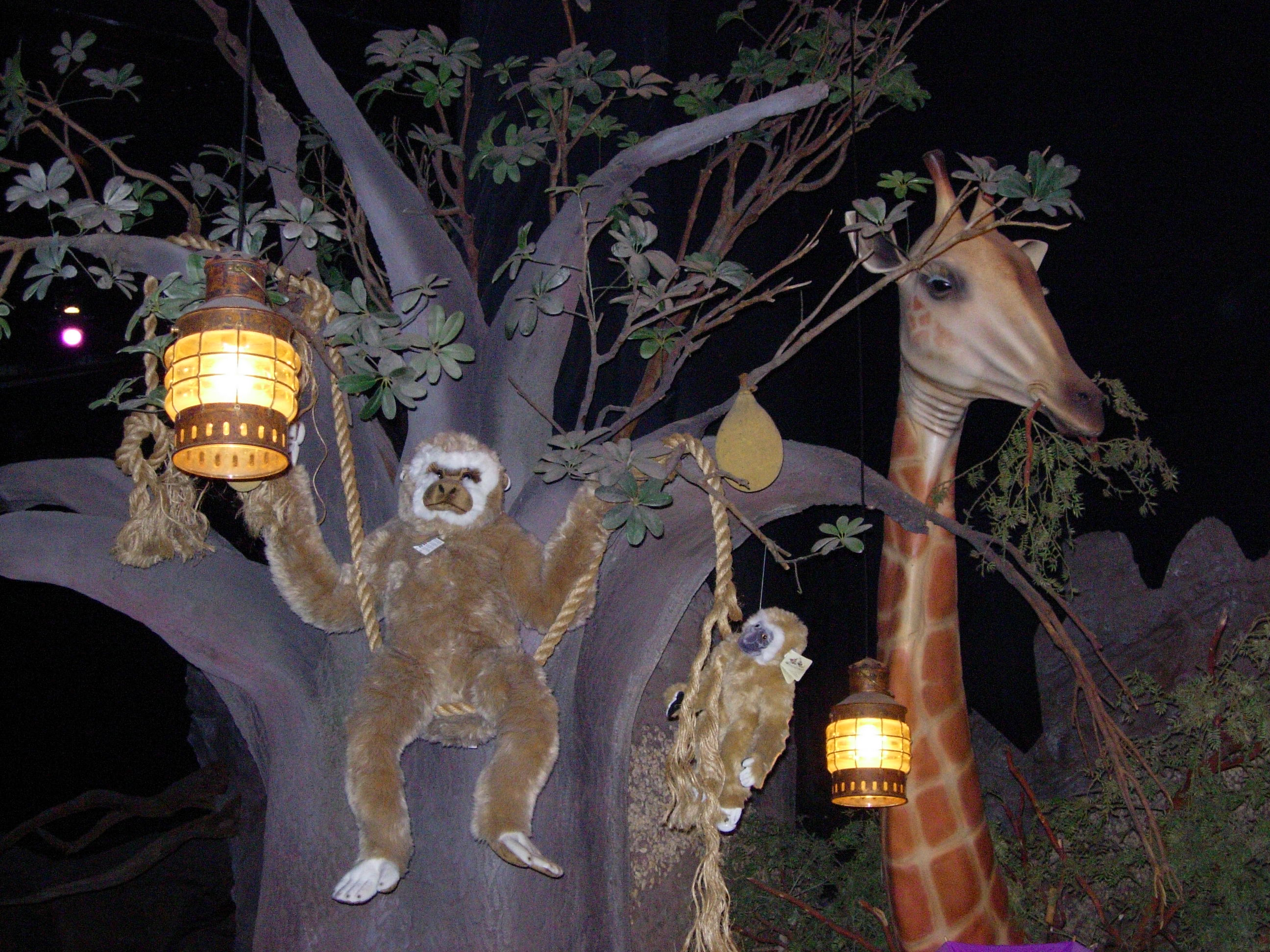 Plaine de jeux intérieur de Pandadroom